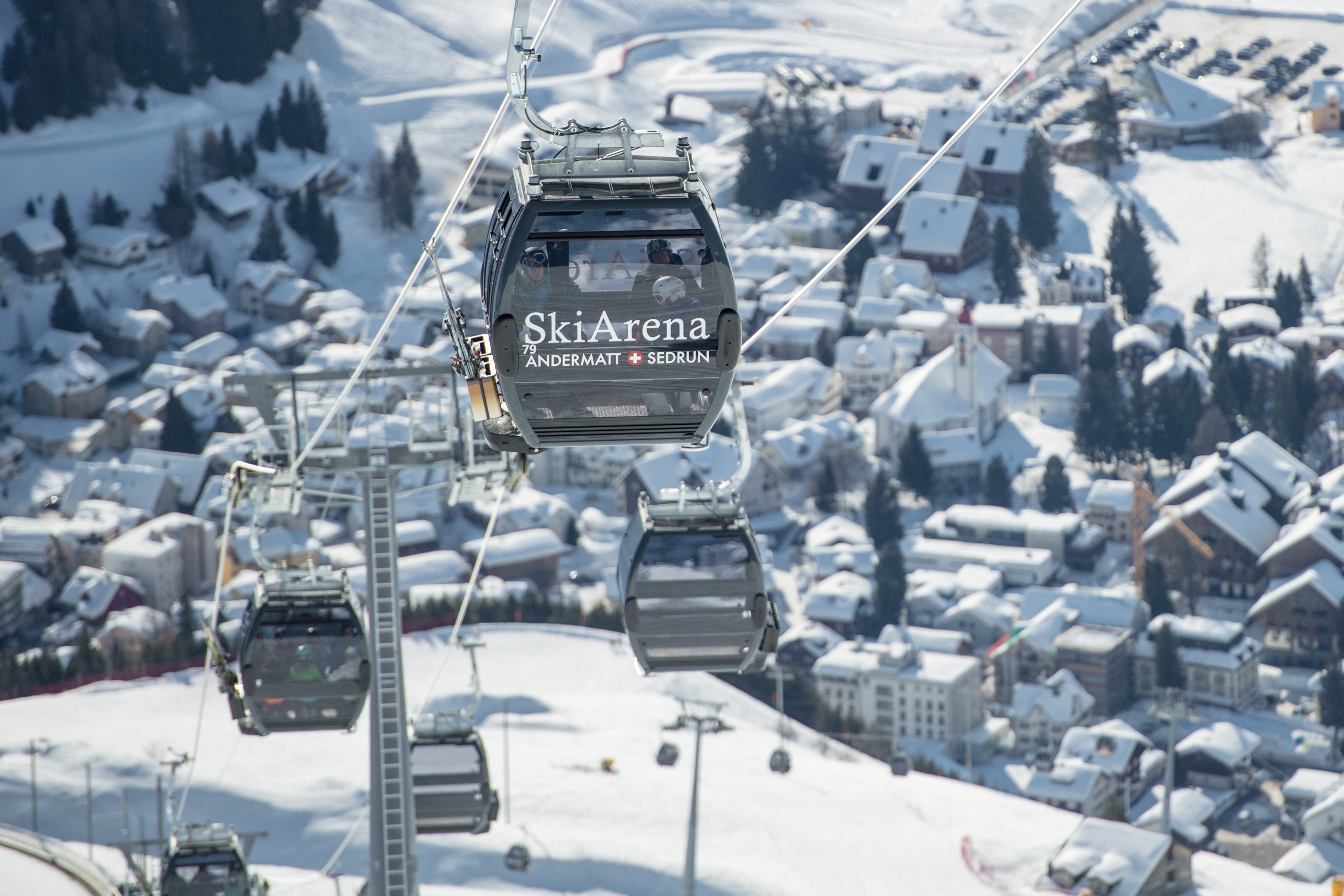 Gütsch-Express in der Skiarena Andermatt-Sedrun mit Andermatt im Hintergrund